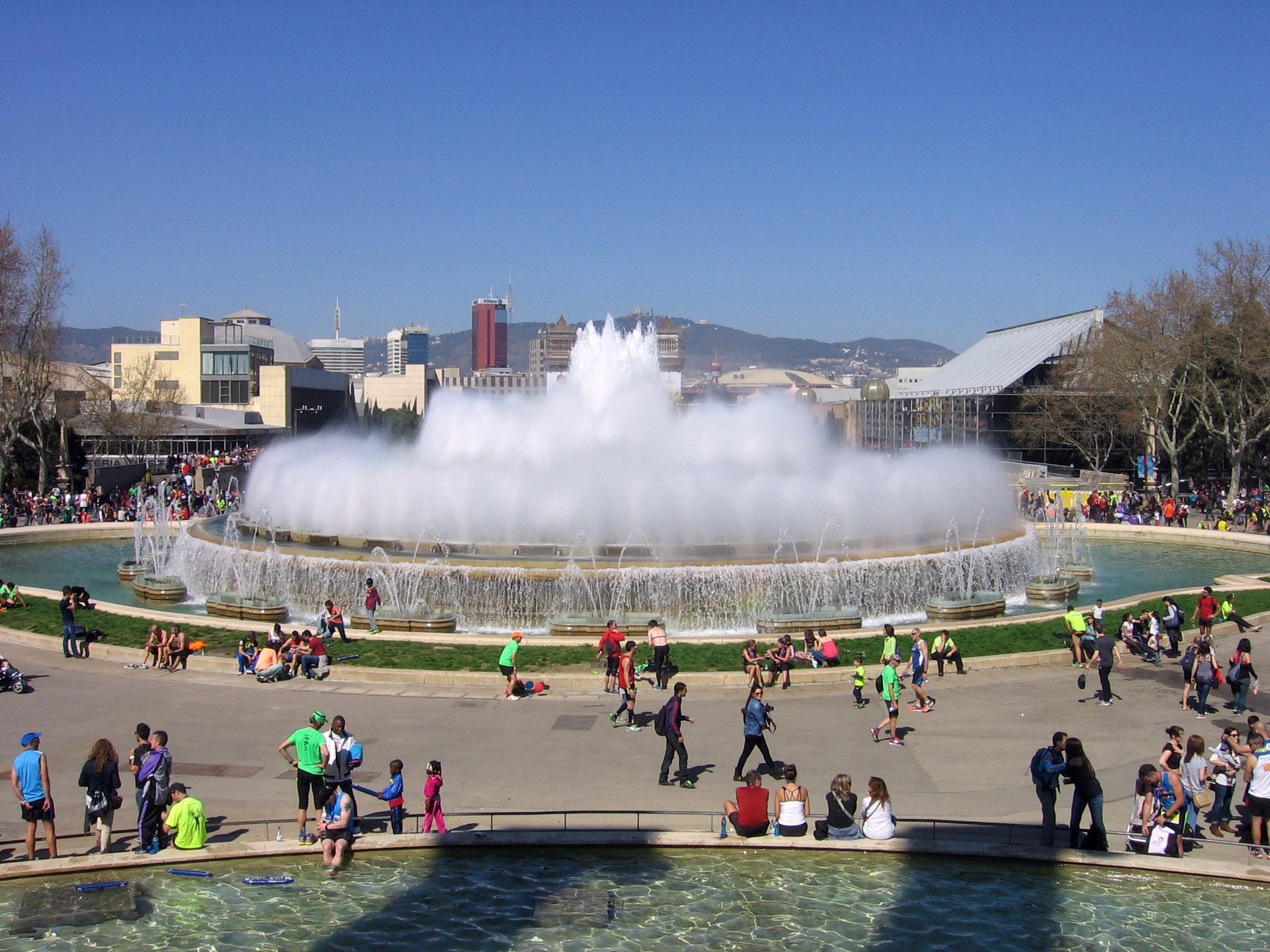 Fuente Mágica de Montjuïc.